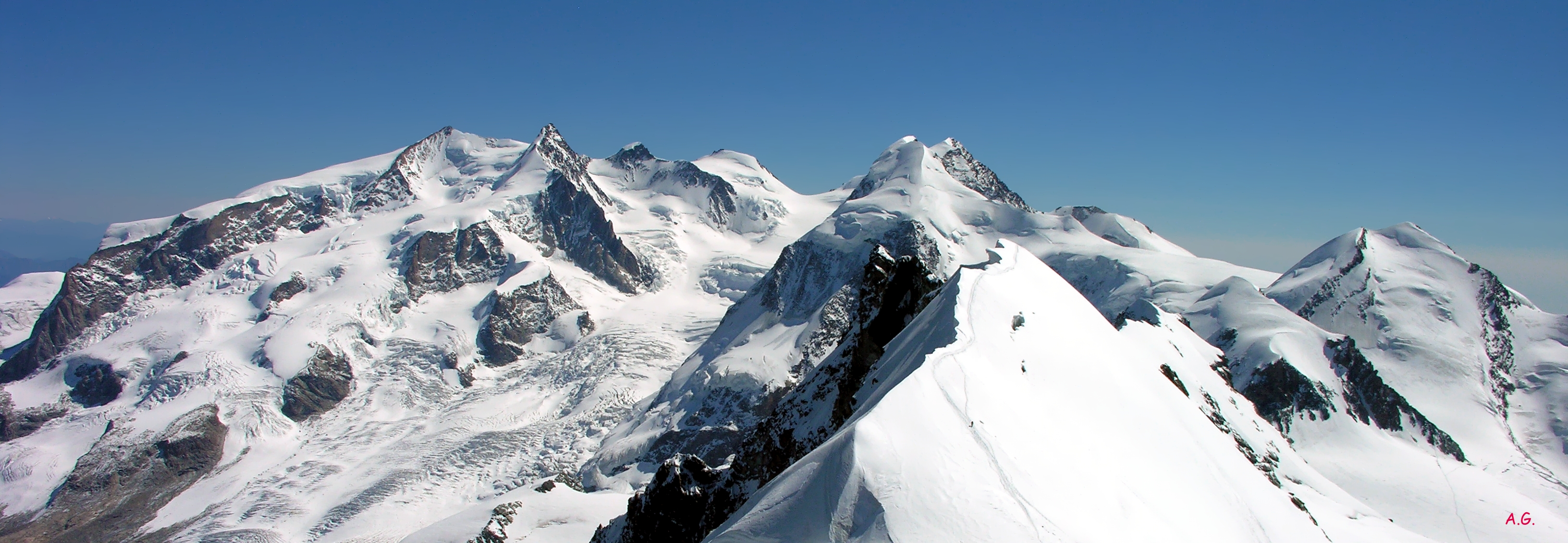 Il massiccio del Monte Rosa - Alpi Pennine - Italy